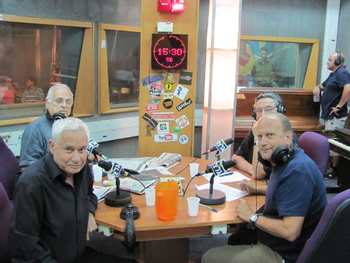 ליד השולחן יושבים ארבעת המגישים של התכנית בזמן בו ירדה ביוני 2010: דליק ווליניץ, גדעון רייכר, יעקב אחימאיר ואיתן ליפשיץ